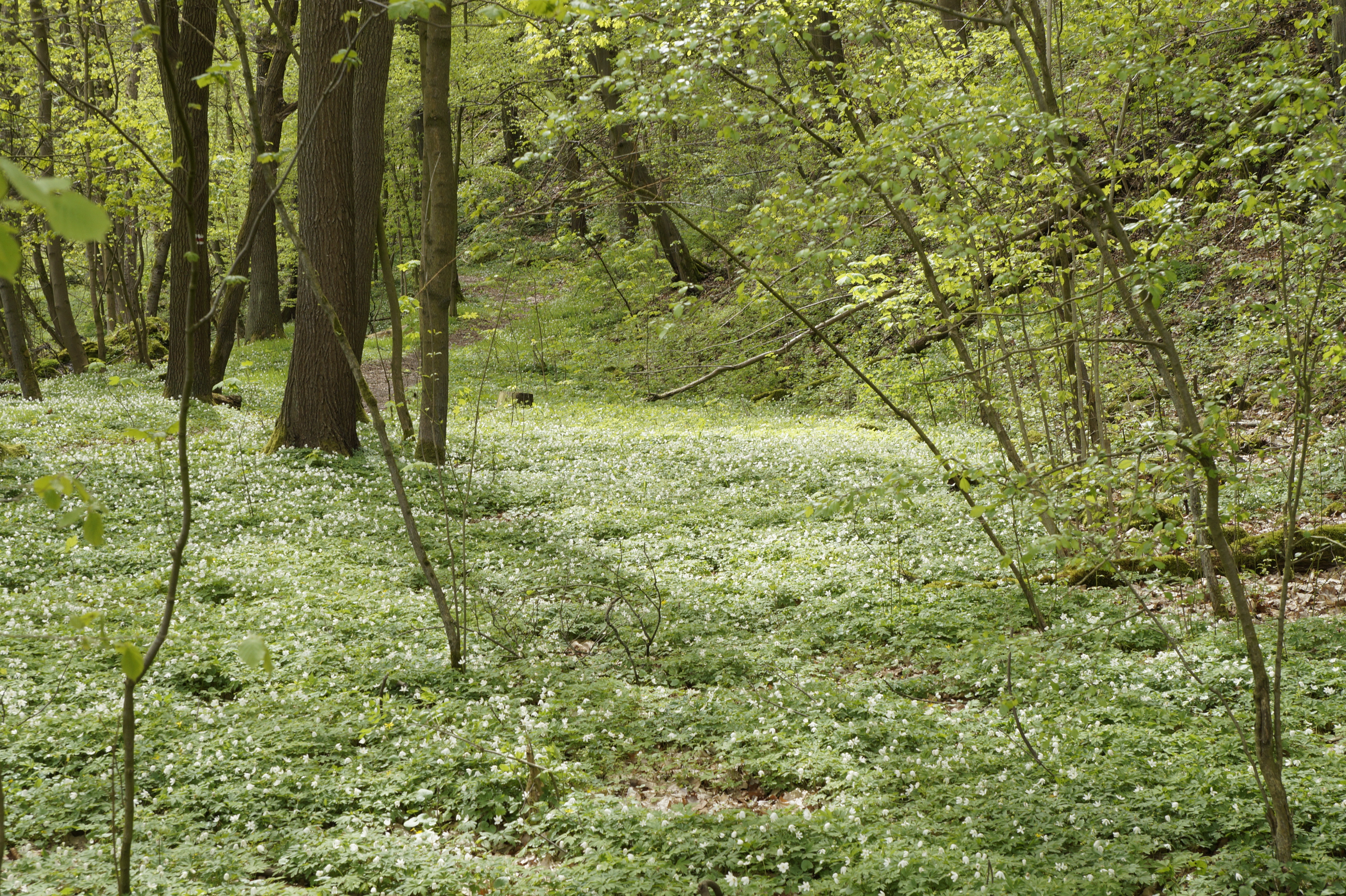 Naturschutzgebiet "Steinicht" (C76): Kurz vor der Einmündung des Ruppertsgrüner Baches in die Weiße Elster weitet sich das Tal